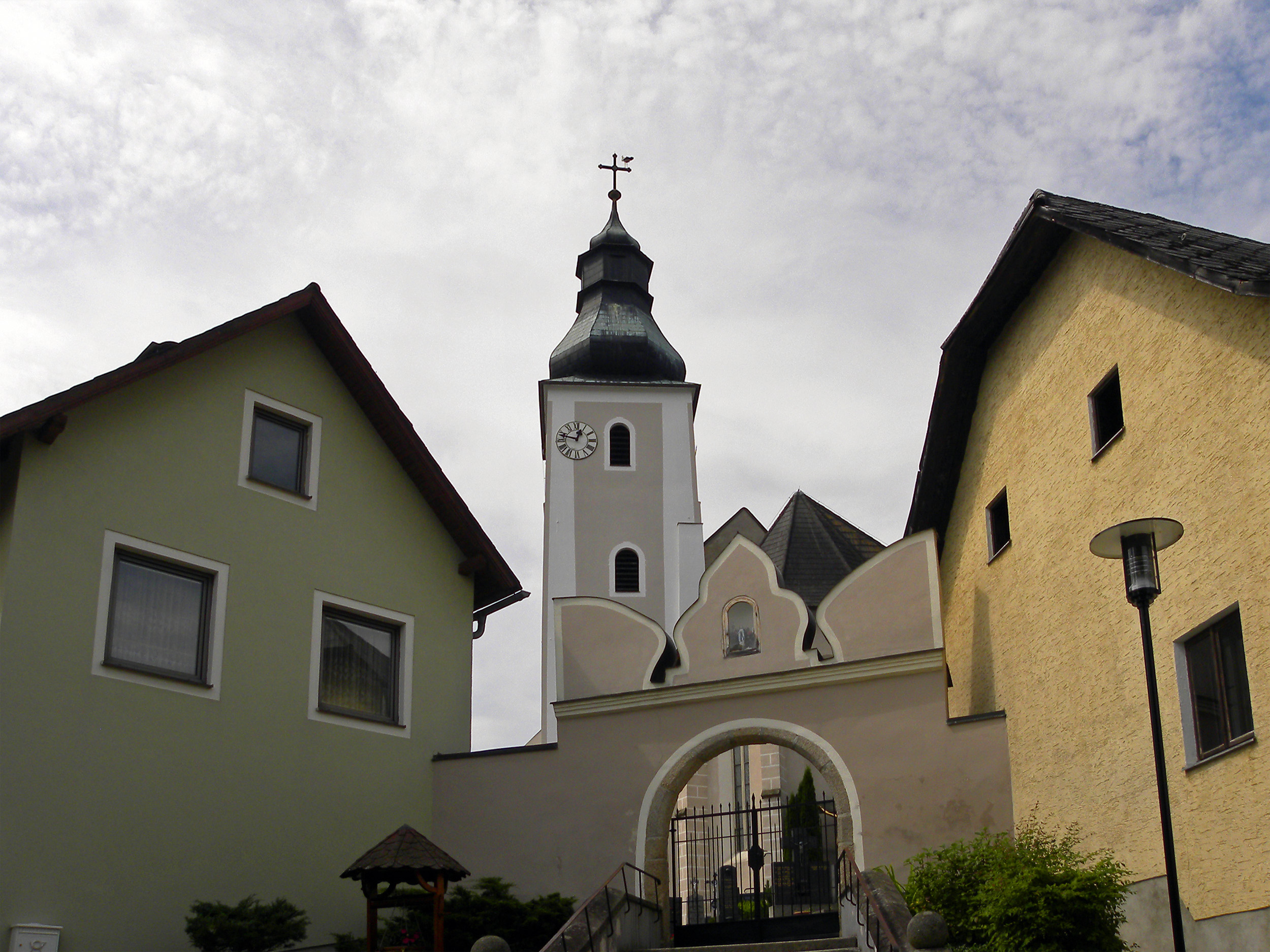 Kath. Pfarrkirche Mariä Geburt und Friedhof